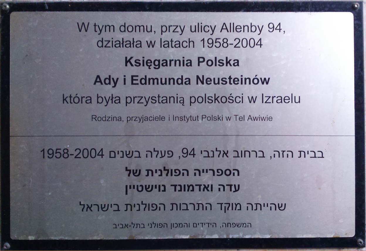 Tablica pamiątkowa znajdująca się na budynku przy ulicy Allenby 94 w Tel Awiwie, w którym mieściła się Księgarnia Polska.